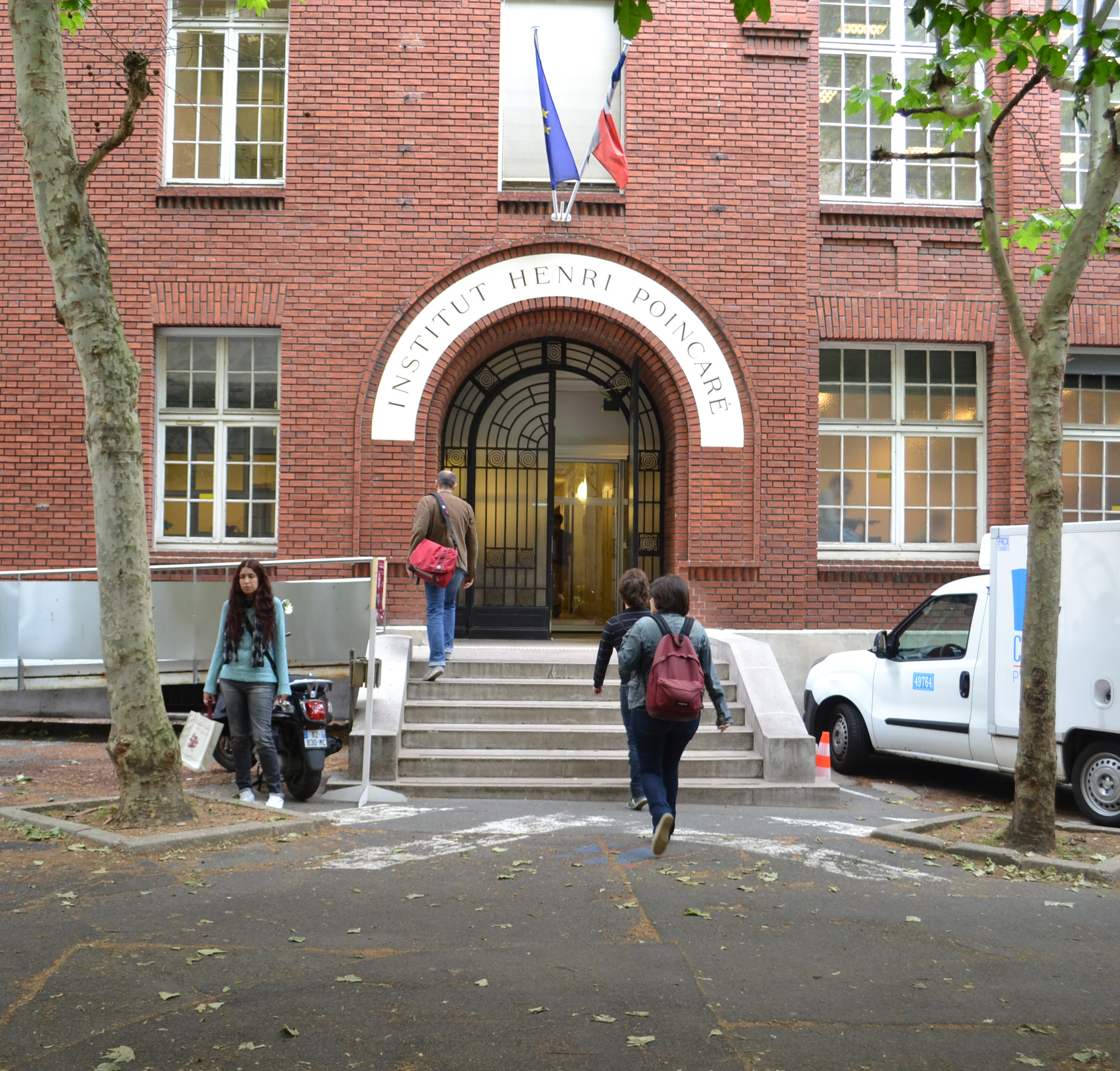 Porte d'entrée de l'IHP